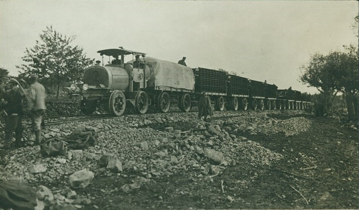 Снимка на австро-унгарска електро-бензинова ж.п. линия край Костаниевица (в дн. Словения) през Първата световна война.